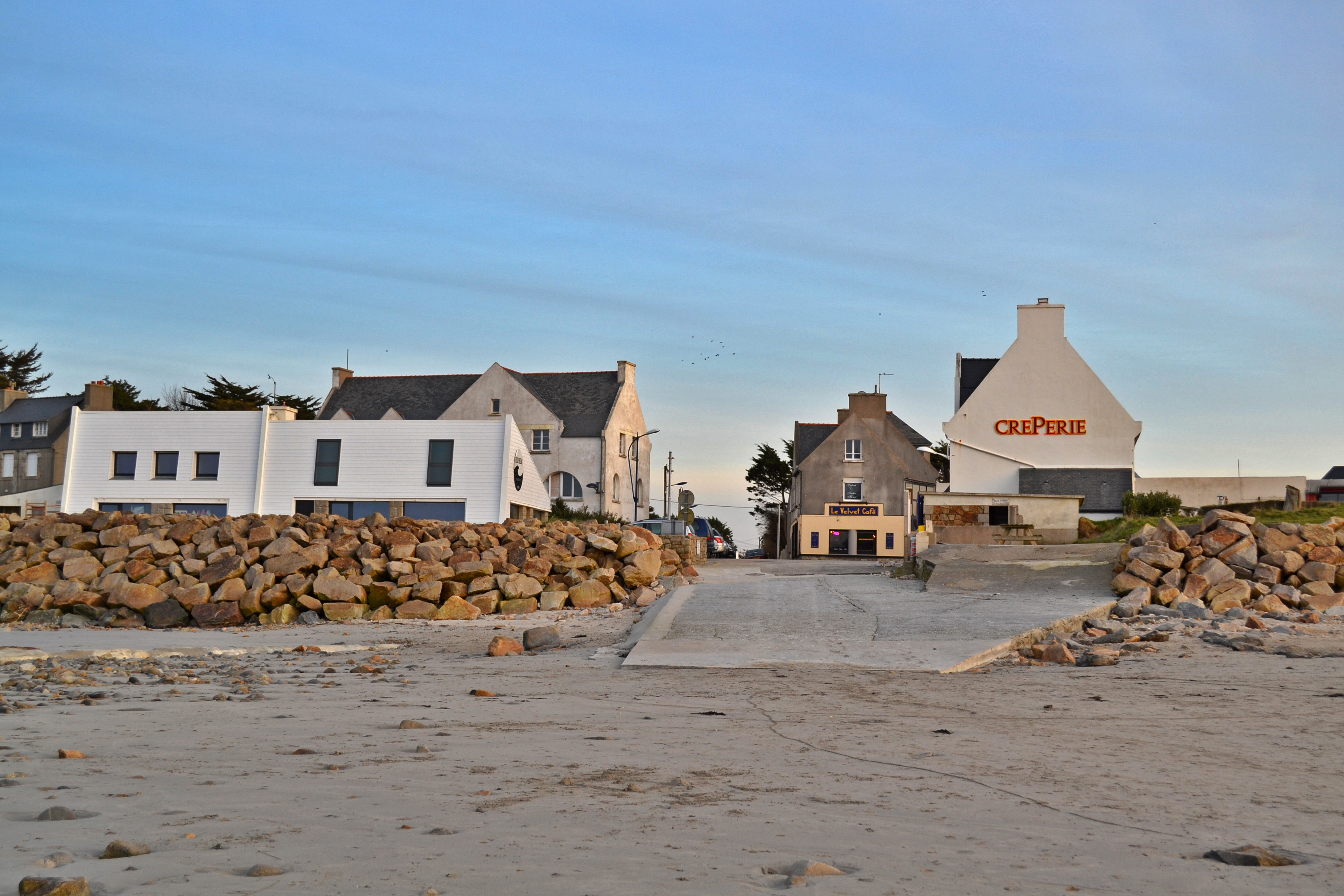 Couché de soleil sur la plage du Dossen à Santec, nord Finistère.